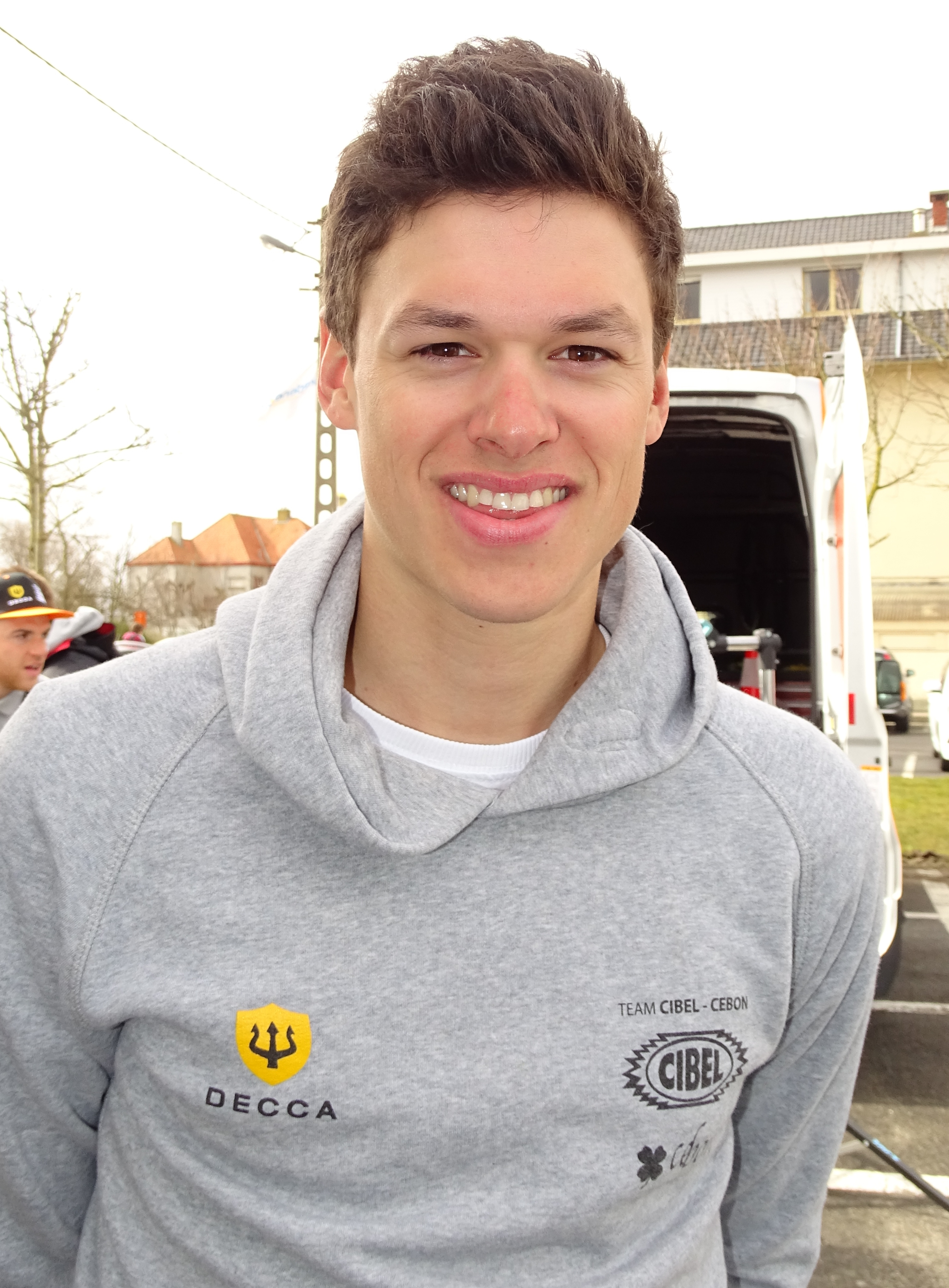 Reportage réalisé le vendredi 18 mars à l'occasion du départ de la Handzame Classic 2016 à Bredene, Belgique.